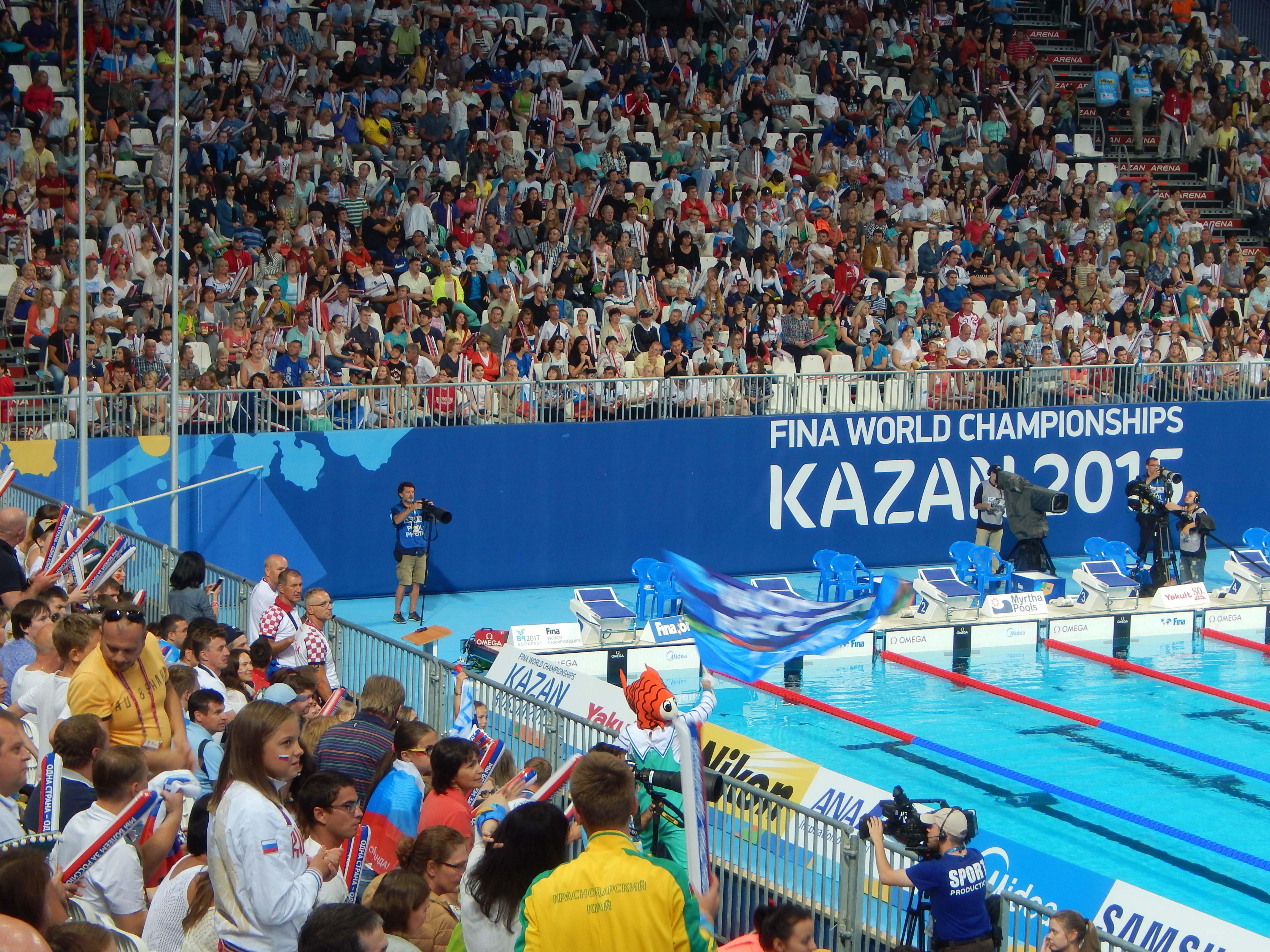 Казань Арена после установленного мирового рекорда Кэти Ледеки